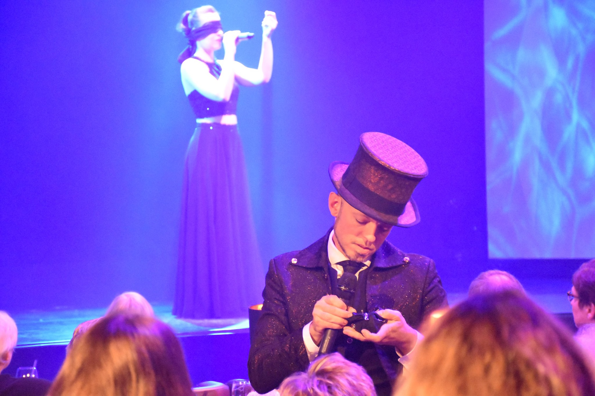 Timothy Trust und Diamond während der ´Mentalmagie` Vorführung